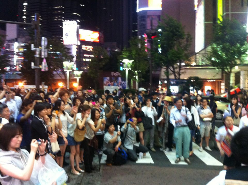 人だかりで賑わいを見せた。